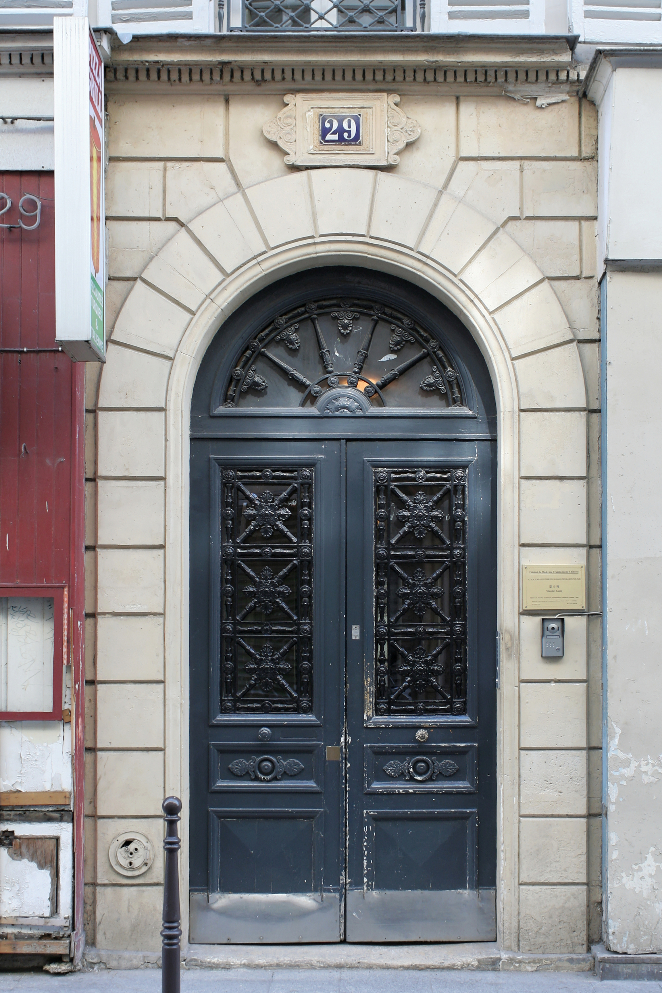 Porte du 29 rue de l'Échiquier (Paris).